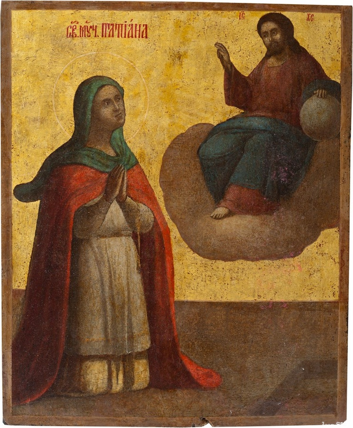 Икона Святой Мученицы Татьяны . Не позднее XIX века.